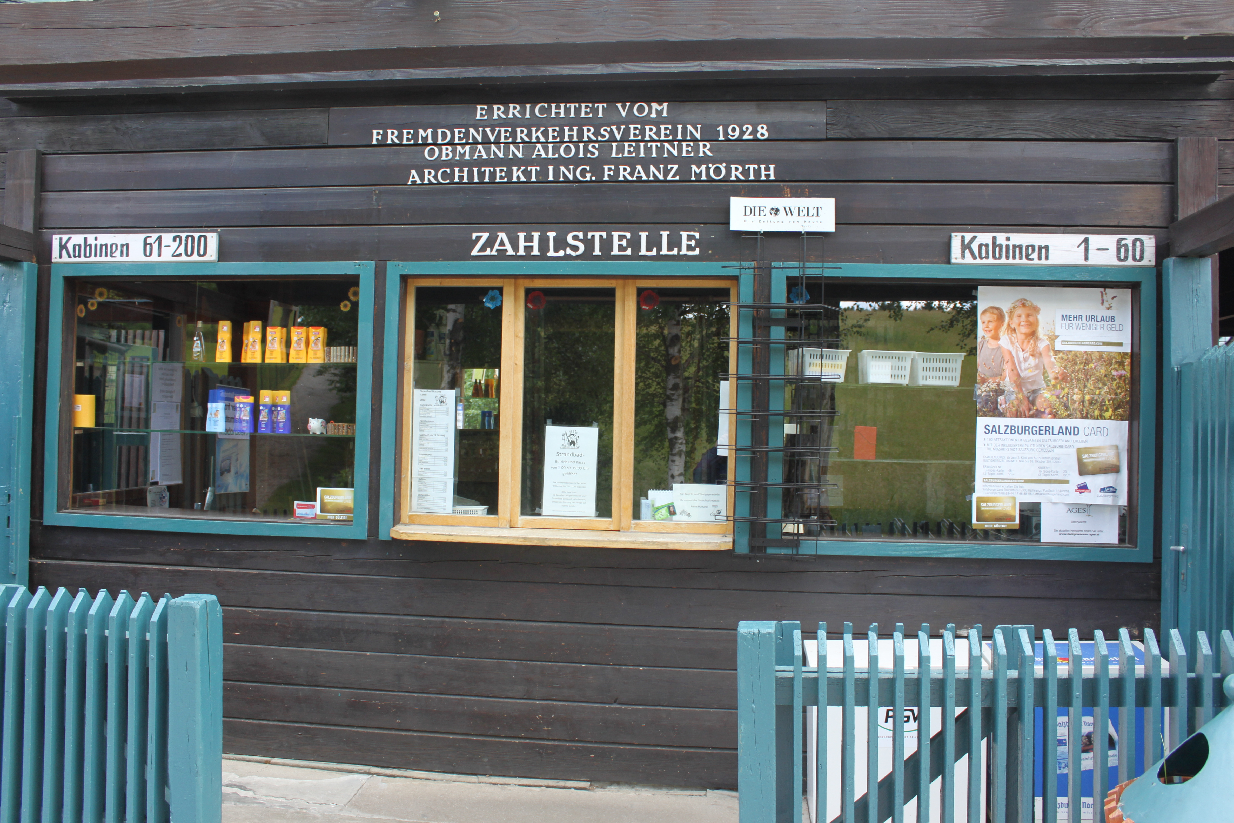 Strandbad